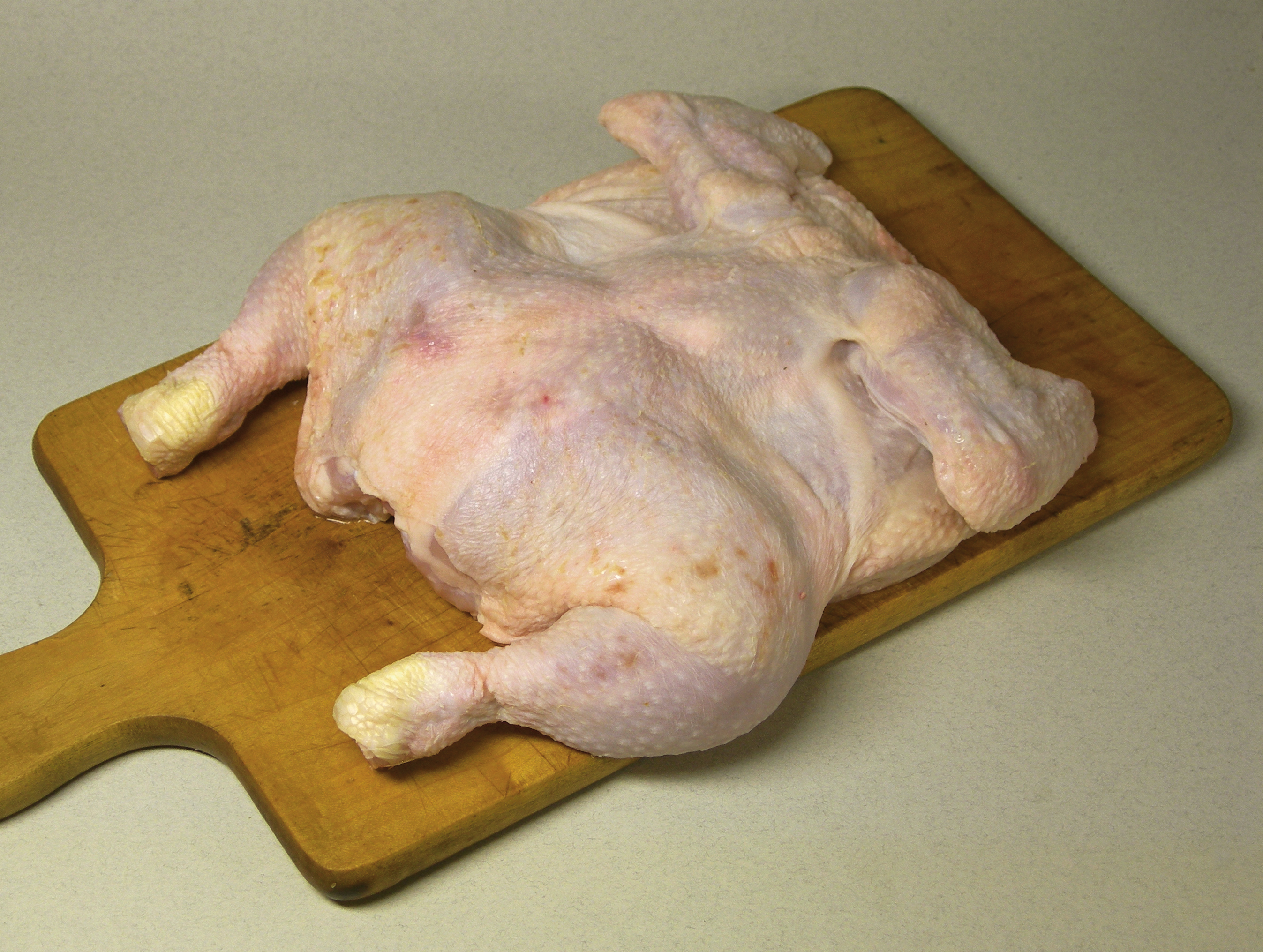 Ausgenommenes rohes Hähnchen, zum Braten aufgeklappt (en crapaudine)